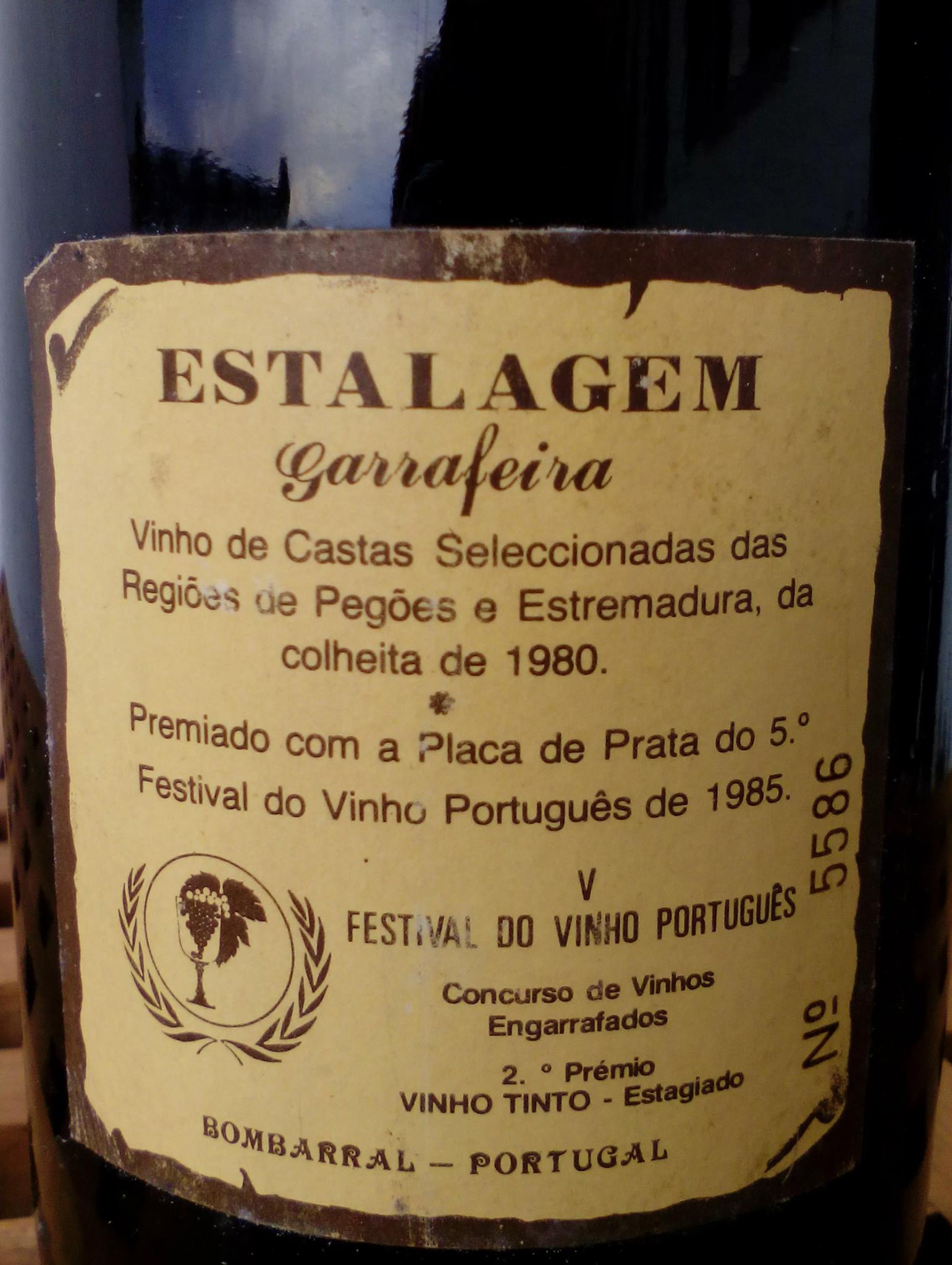 Contra-rótulo do Estalagem tinto, da firma Sovistrema, Bombarral